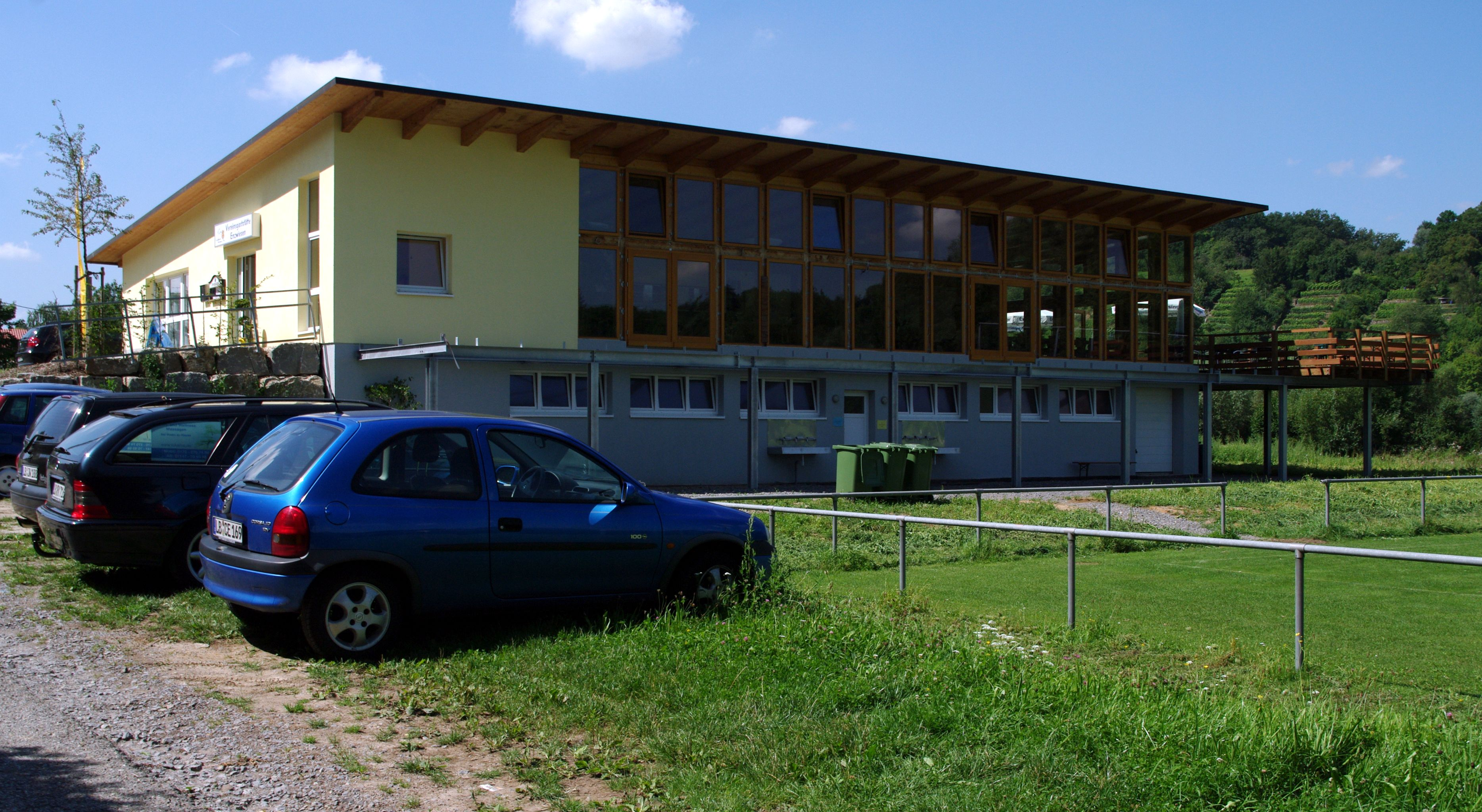 Das neue Vereinsheim des TSV Unterriexingen